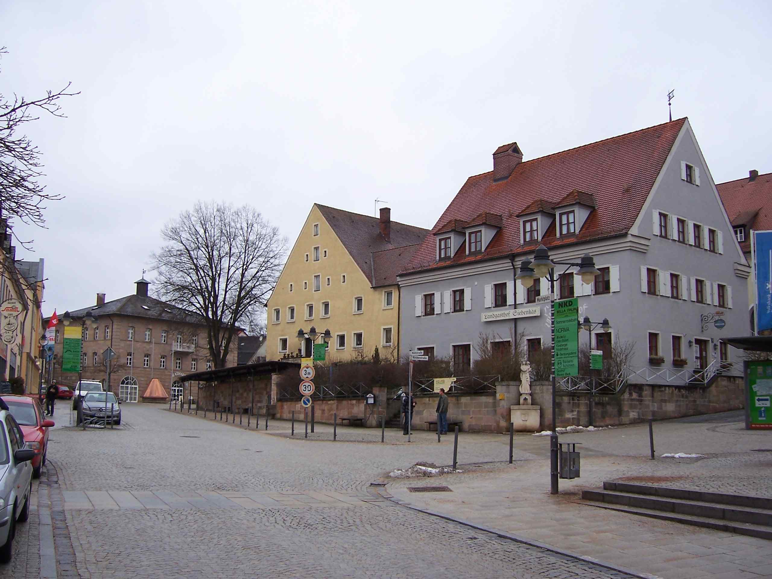 Marktplatz Pleinfeld rechts